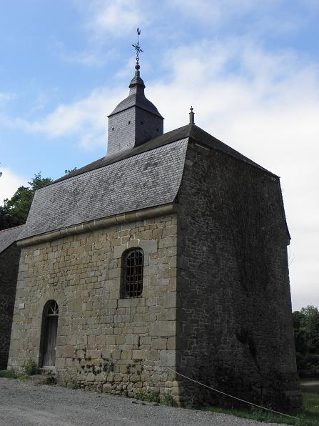 Chapelle Sainte-Catherine à Saint-Brice-en-Coglès (35)